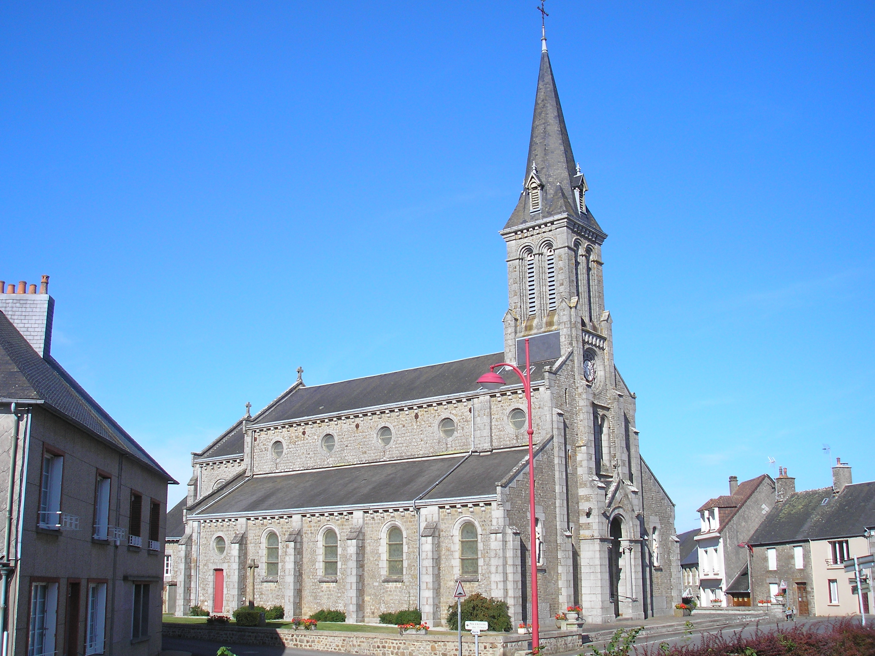 Saint-Paul (Normandie, France). L'église Saint-Paul.